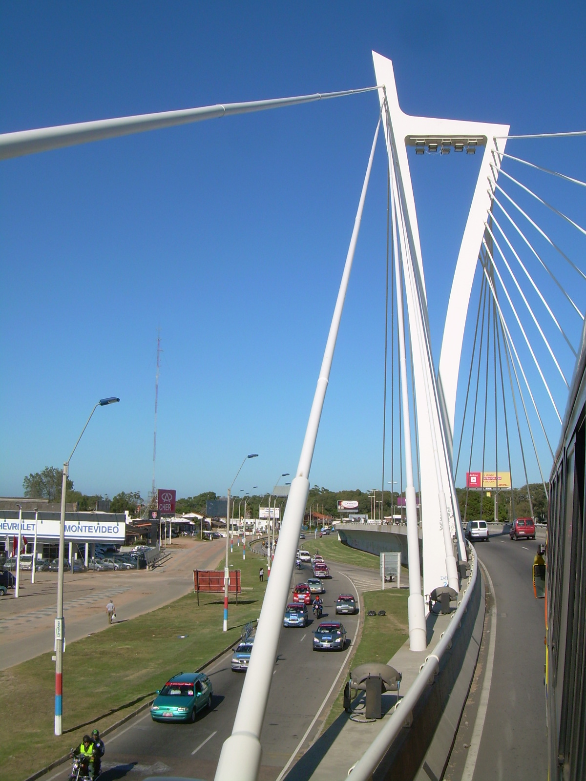 Ponte das Américas, entrada de Montevideo, Uruguai